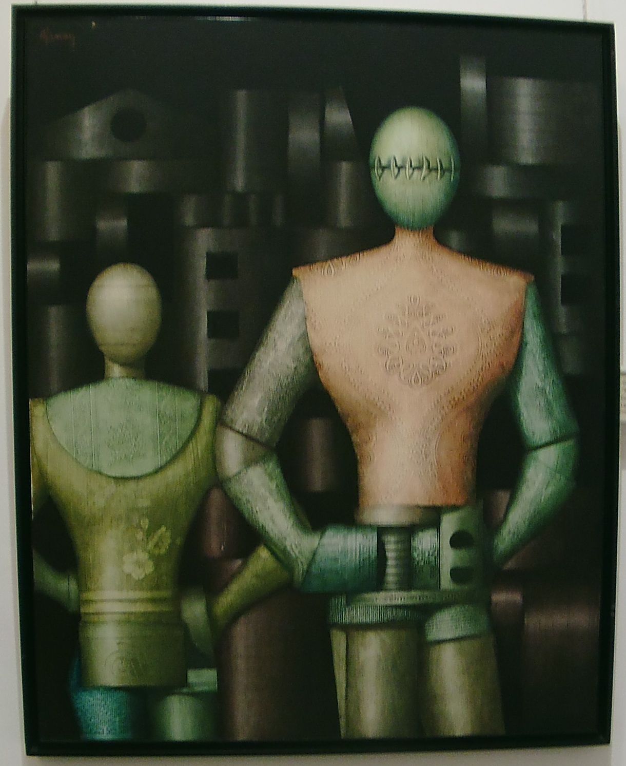 Gustavo Alamón Collage sobre tela 1991